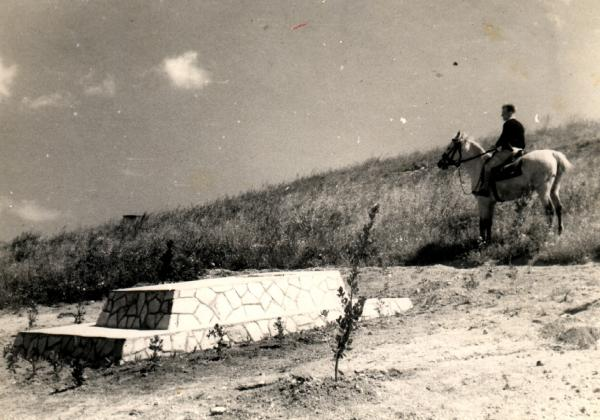 זה היה היום הקשה ביותר של חברי עין השופט שהיו בג'וערה.מהמארב נפתחה אש על עגלה עמוסה בחברים שחזרה מיום עבודה.שני חברים נהרגו במקום.אליעזר קרונגולד ואפרים טיקטין